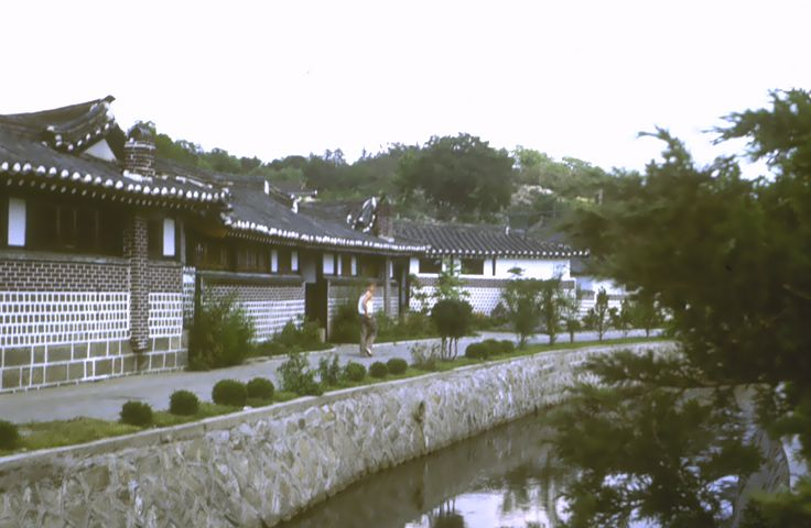 Kaesong - alte koreanische Häuser